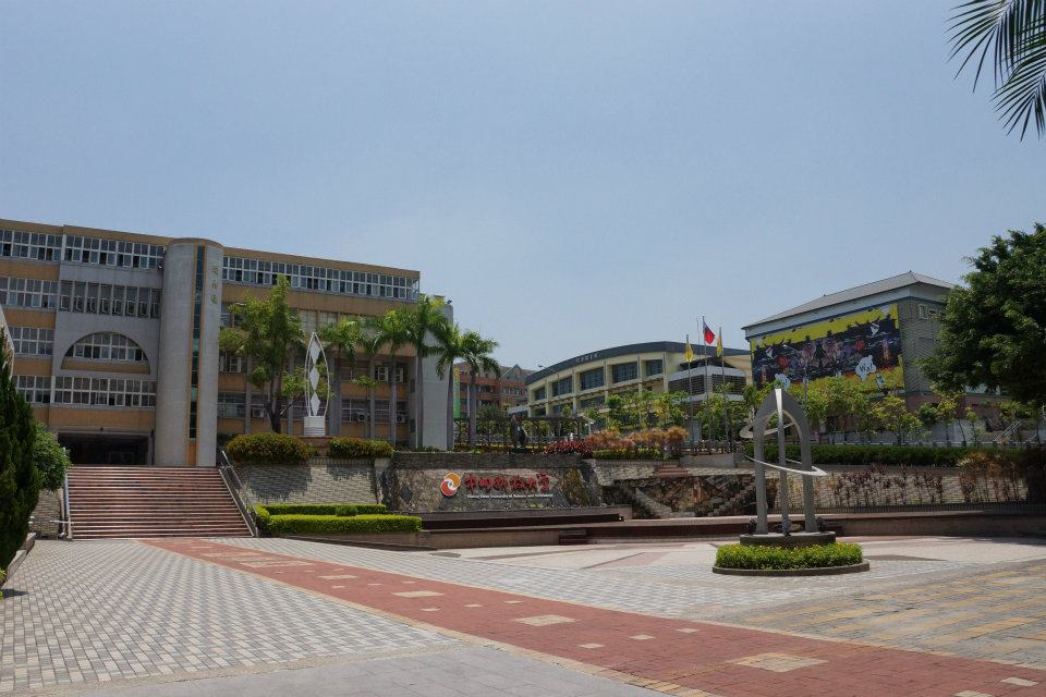 中州科技大學時期-淮園廣場